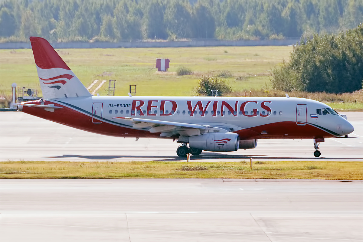 Red Wings, RA-89002, Sukhoi Superjet 100-95B